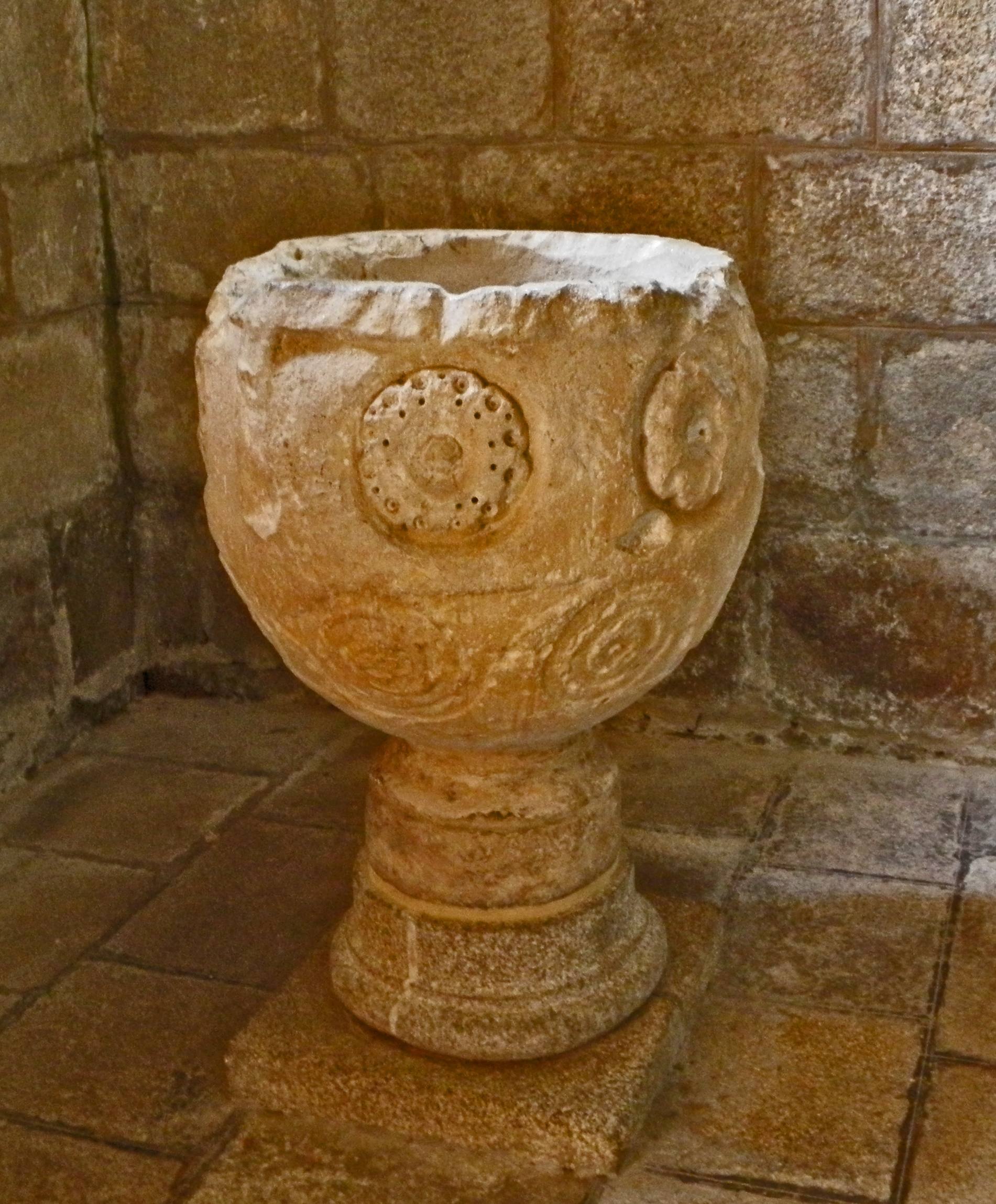 Pila bautismal que según la tradición, es una de las hidrías en las que Jesús hizo el milagro de la conversión de agua en vino en las bodas de Caná de Galilea